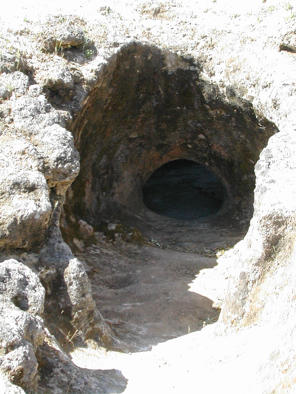 Gruta artificial. Quinta do Anjo. Palmela